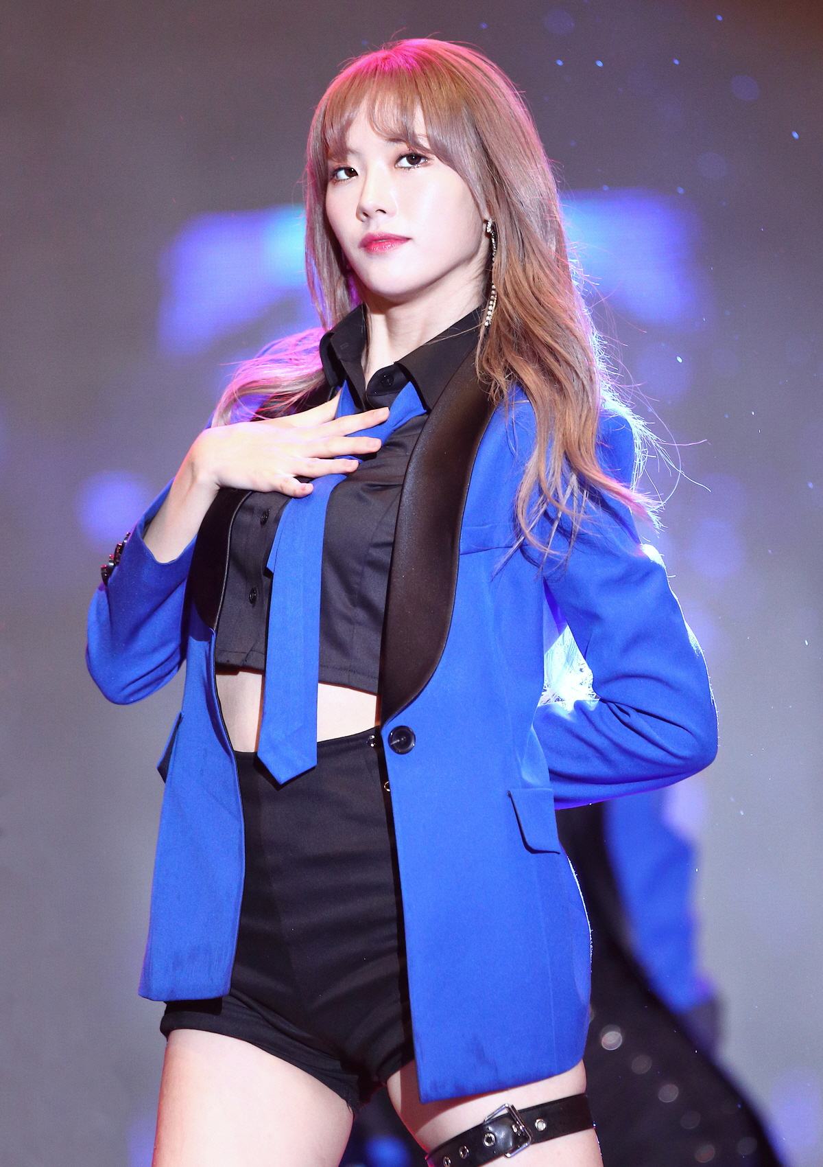 181005 우주소녀 루다 여름 청원생명축제